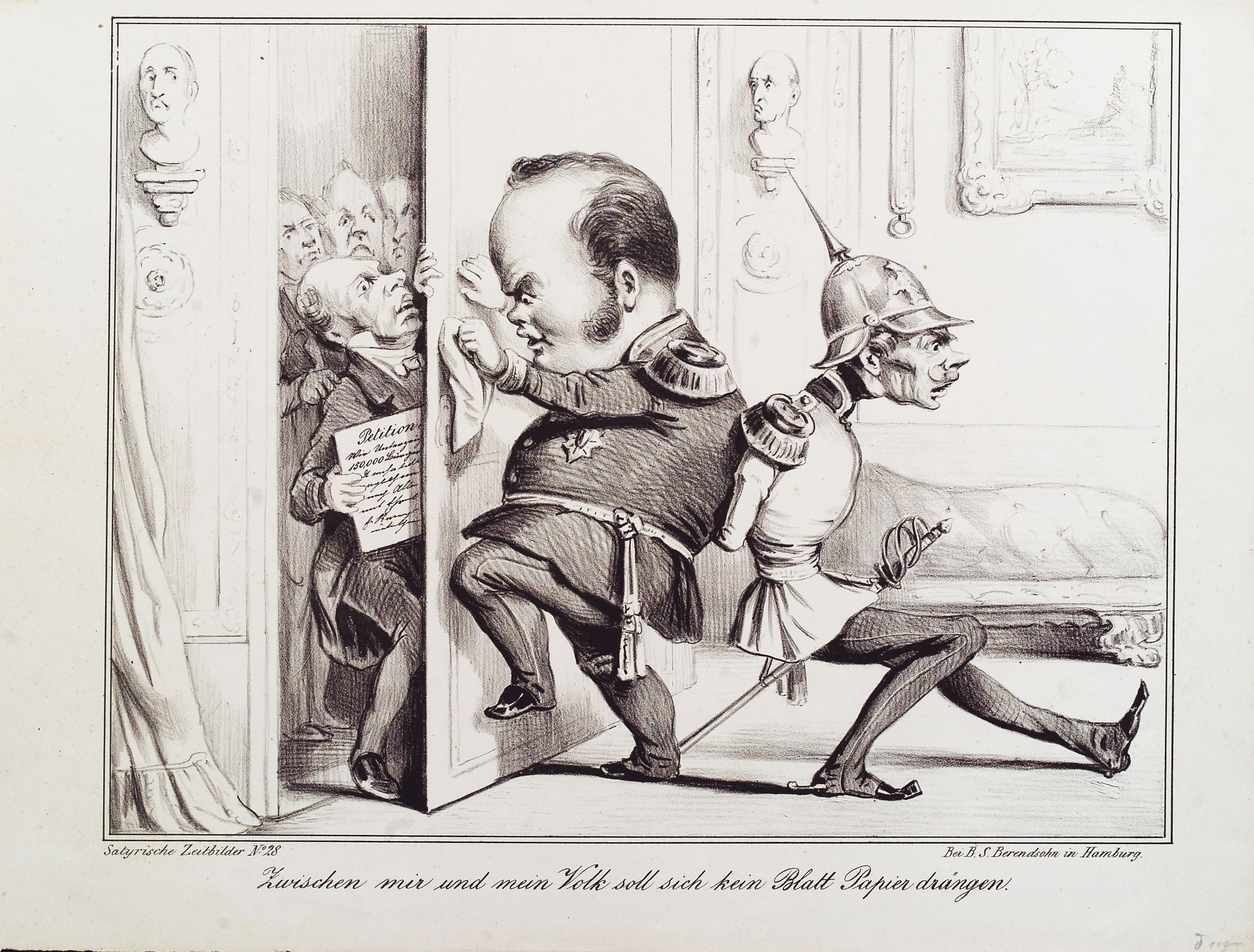 Zwischen mir und mein Volk soll sich kein Blatt Papier drängen! Lithographie, 355 x 336 mm. Satyrische Zeitbilder (28)